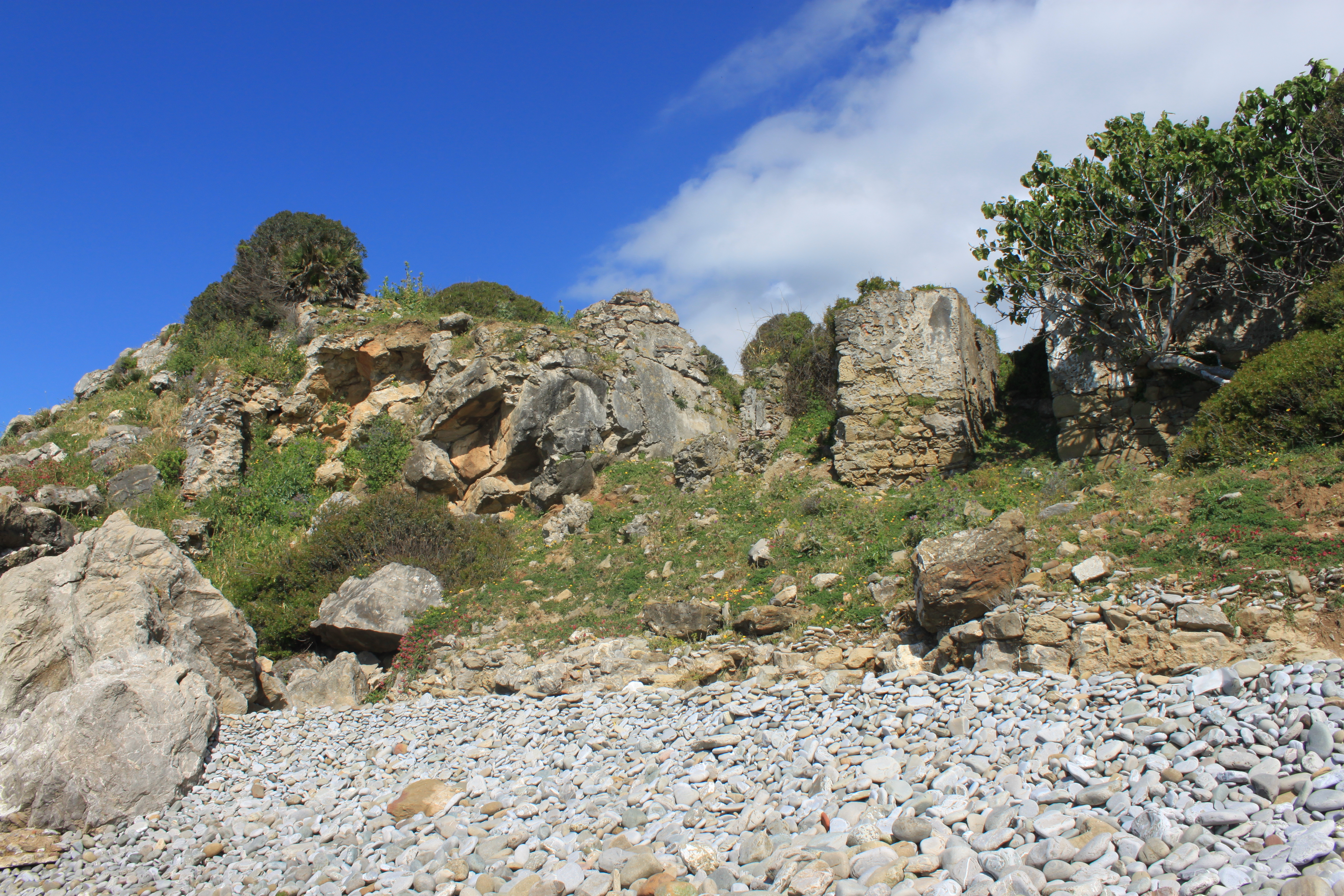 Fuerte de El Tolmo situado en la ensenada de El Tolmo, Algeciras, Andalucía, España. Restos muy arrasados, en primer plano, de la muralla que cerraba el acceso desde la playa al norte del fuerte. Tras ellos aparecen los muros de los cuarteles.